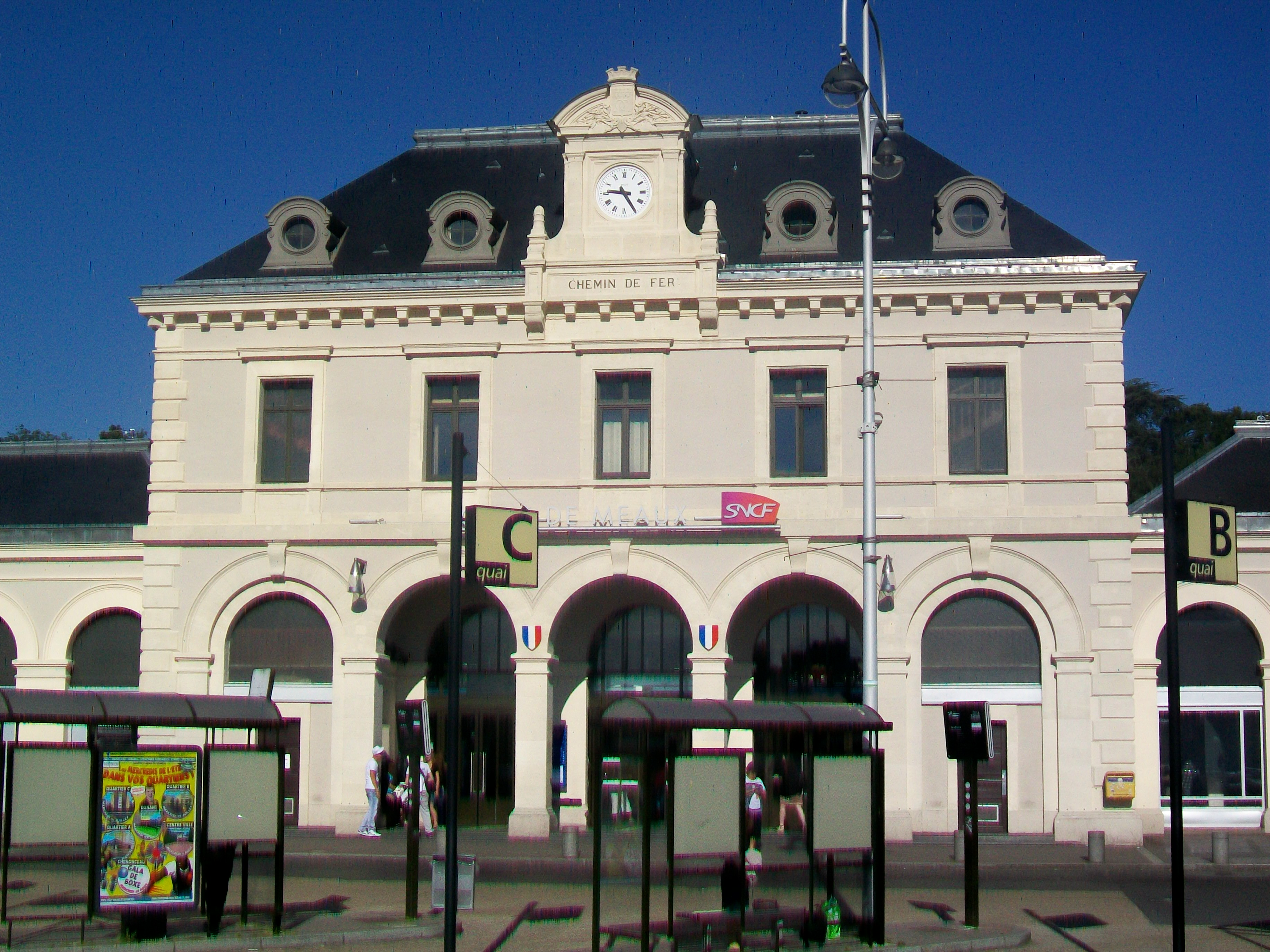 Le bâtiment-voyageurs, façade sur la cour ; au premier plan, une partie de la gare routière.